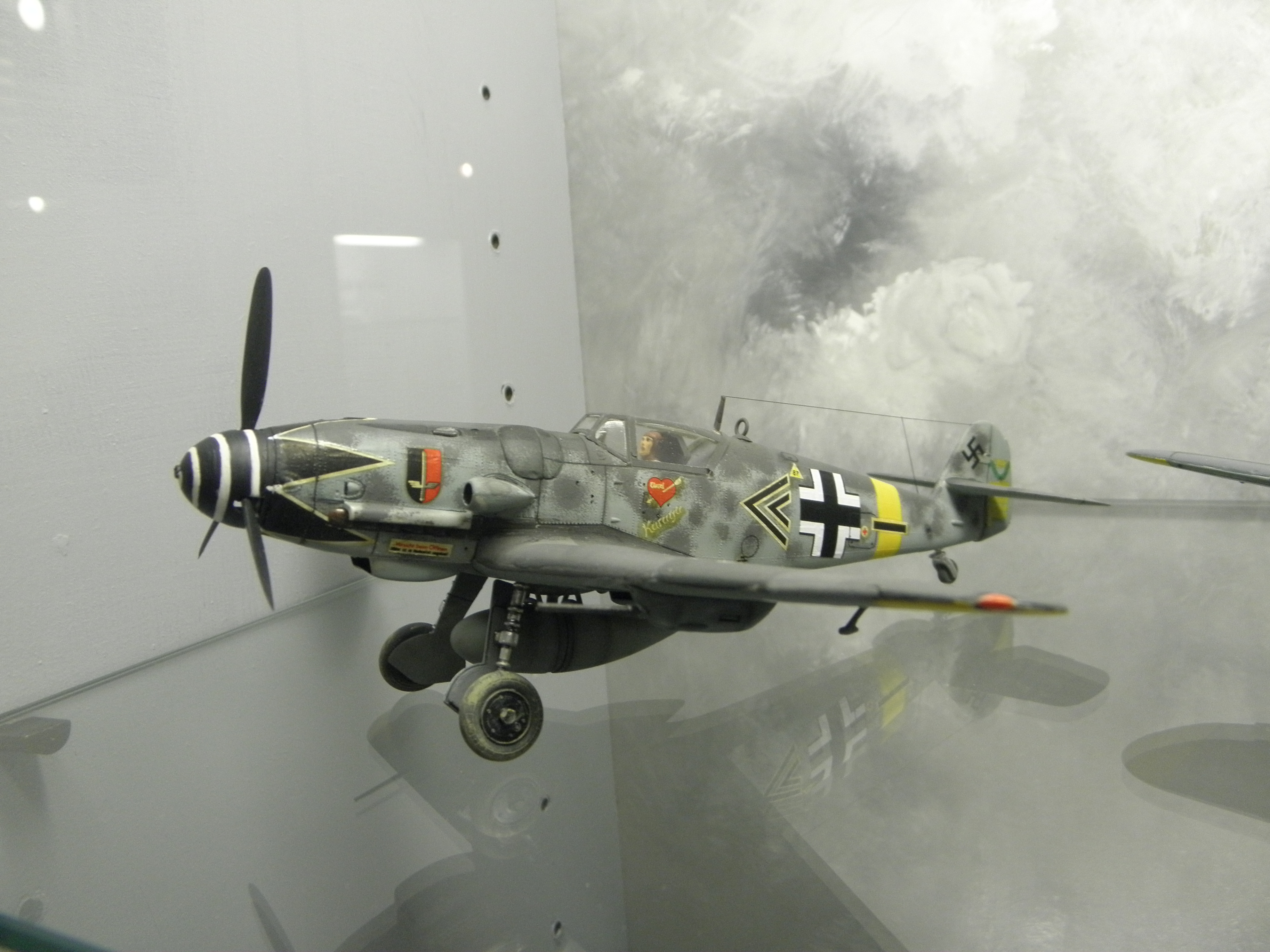 Voghenza, frazione di Voghiera, Museo del modellismo storico: modello in scala del Messerschmitt Bf 109G con la livrea dell'asso tedesco Erich Hartmann.